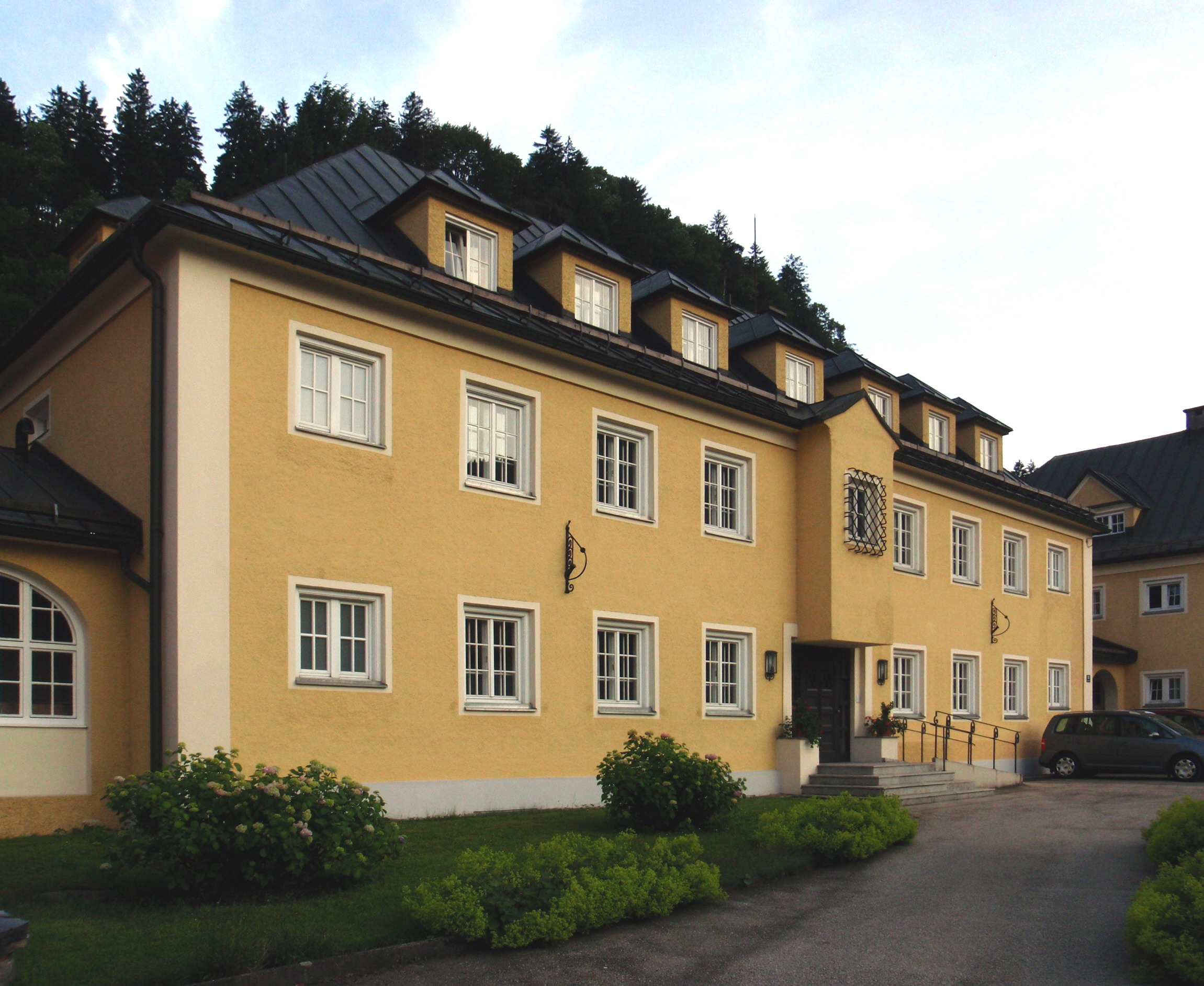 Kloster und Exerzitienhaus "Maria Hilf" in Kufstein-Kleinholz; eigene Aufnahme des Autors